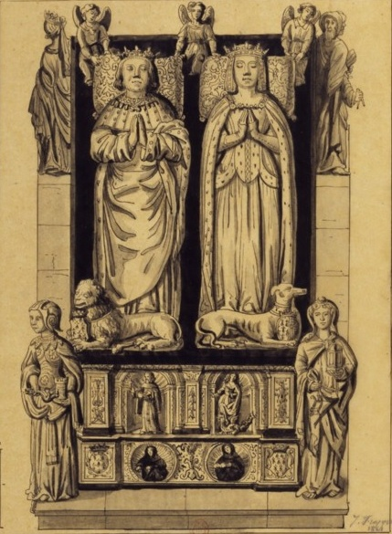 František II. Bretaňský a Markéta z Foix